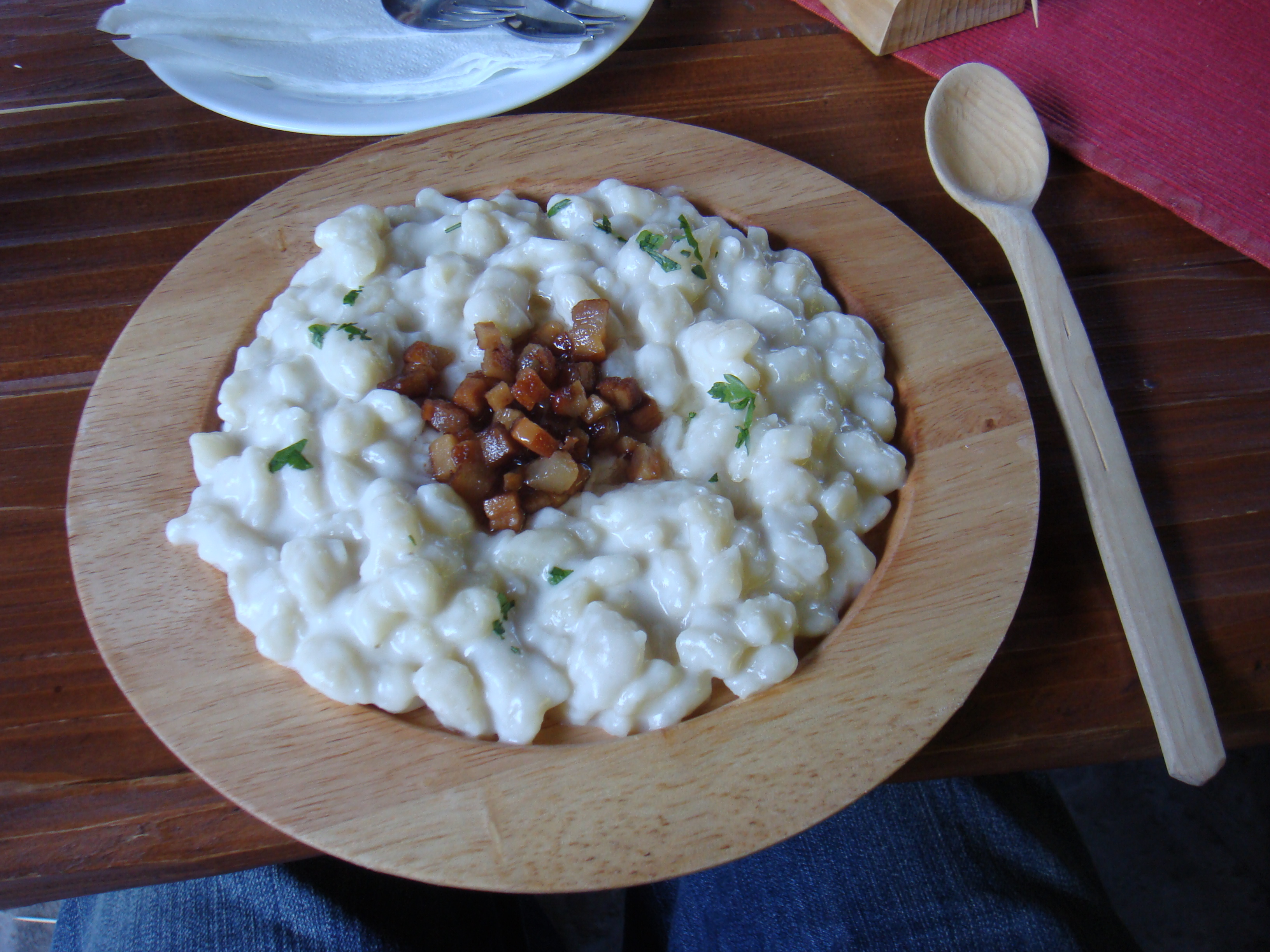 Bryndzové halušky so slaninou